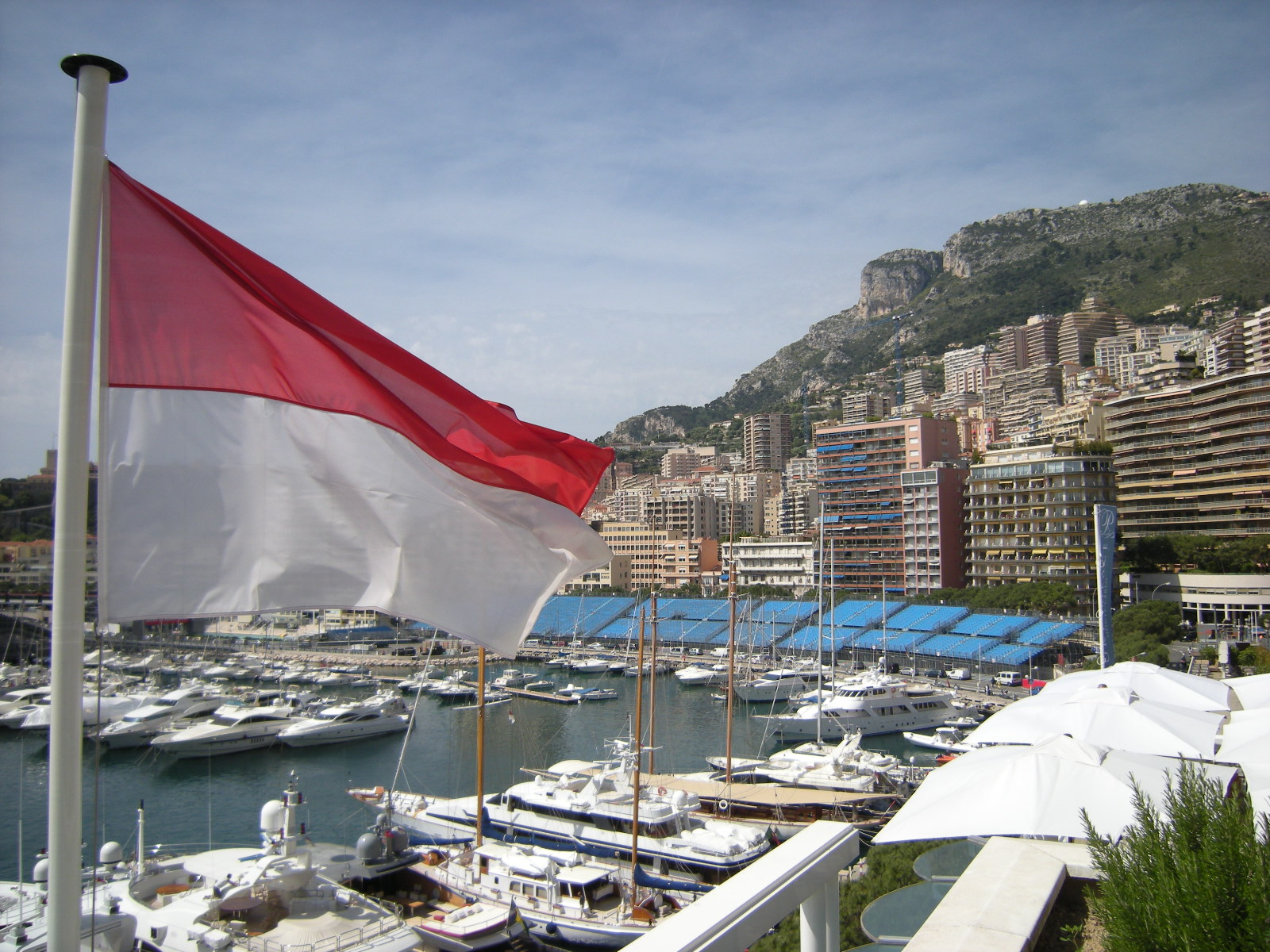 Monte-Carlo - Principado de Mônaco